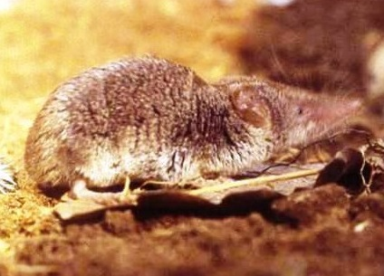 Crocidura sicula, Miller 1900 Campofelice di Roccella (PA), Sicily